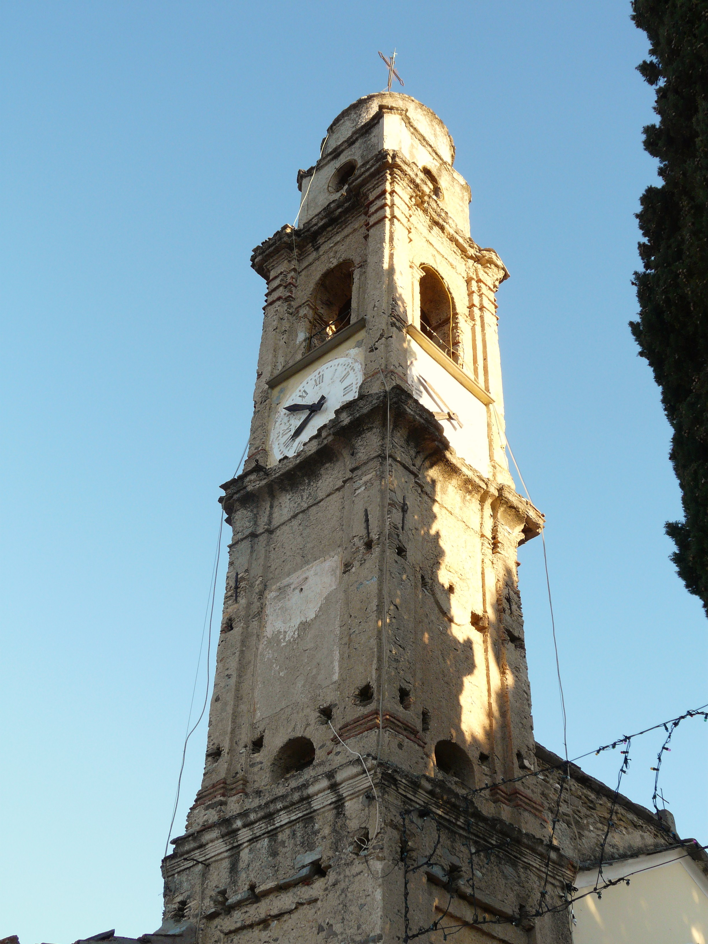 Oratorio dei Santi Cosma e Damiano, Bezzo, Arnasco, Liguria, Italia